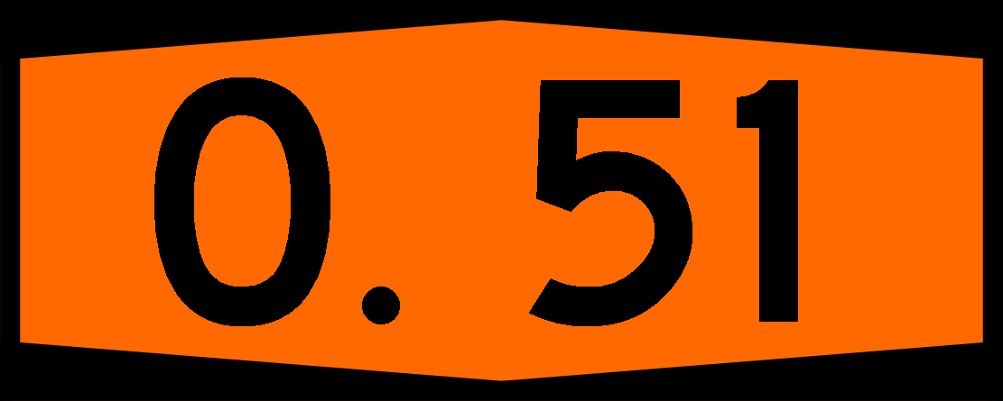 Otoyolu 51